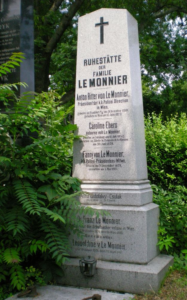 Das Familiengrab der Familie von Anton Ritter von Le Monnier auf dem Wiener Zentralfriedhof (Gruppe 42, Reihe G1, Nummer 28). Ursprünglich befand sich das Familiengrab auf dem Hundsturmer Friedhof (heute: Haydnpark in Wien-Meiding)